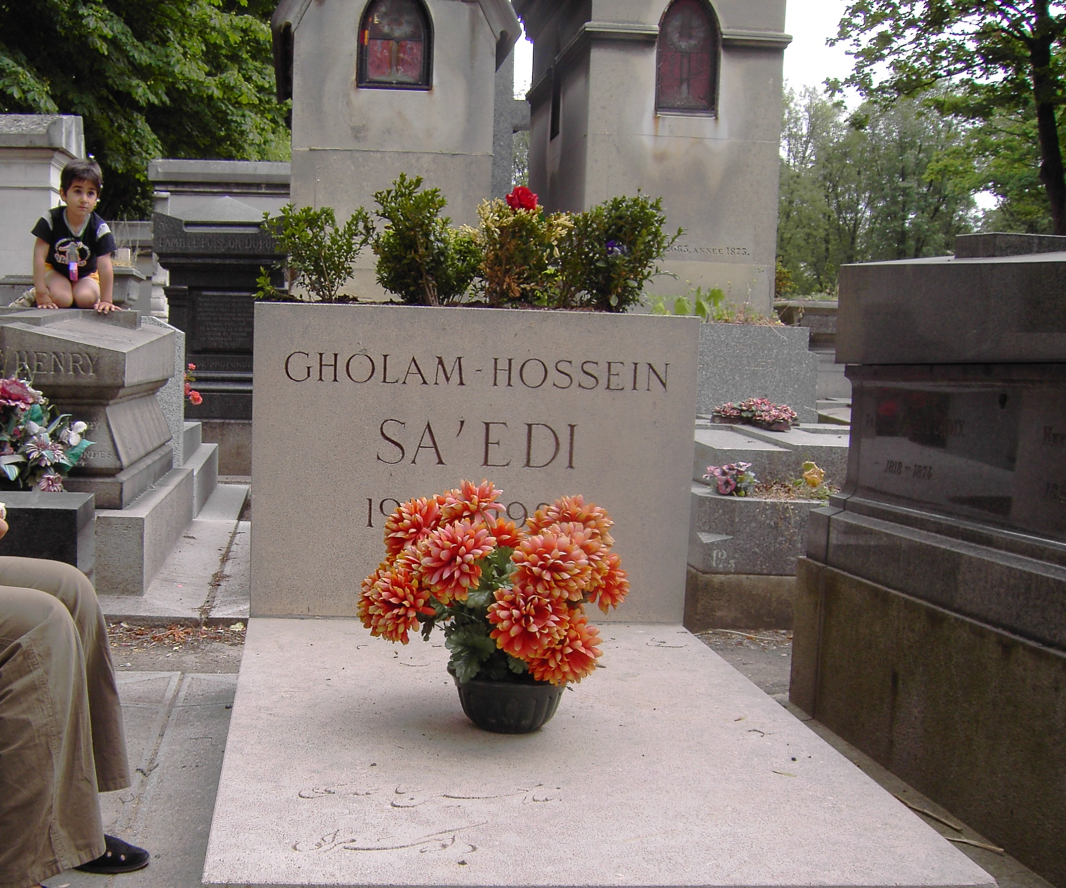 ساعدی